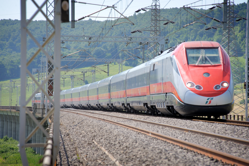 I treni Frecciarossa vengono realizzati con ETR 500 e, dal 14 Giugno 2015, con ETR 1000.